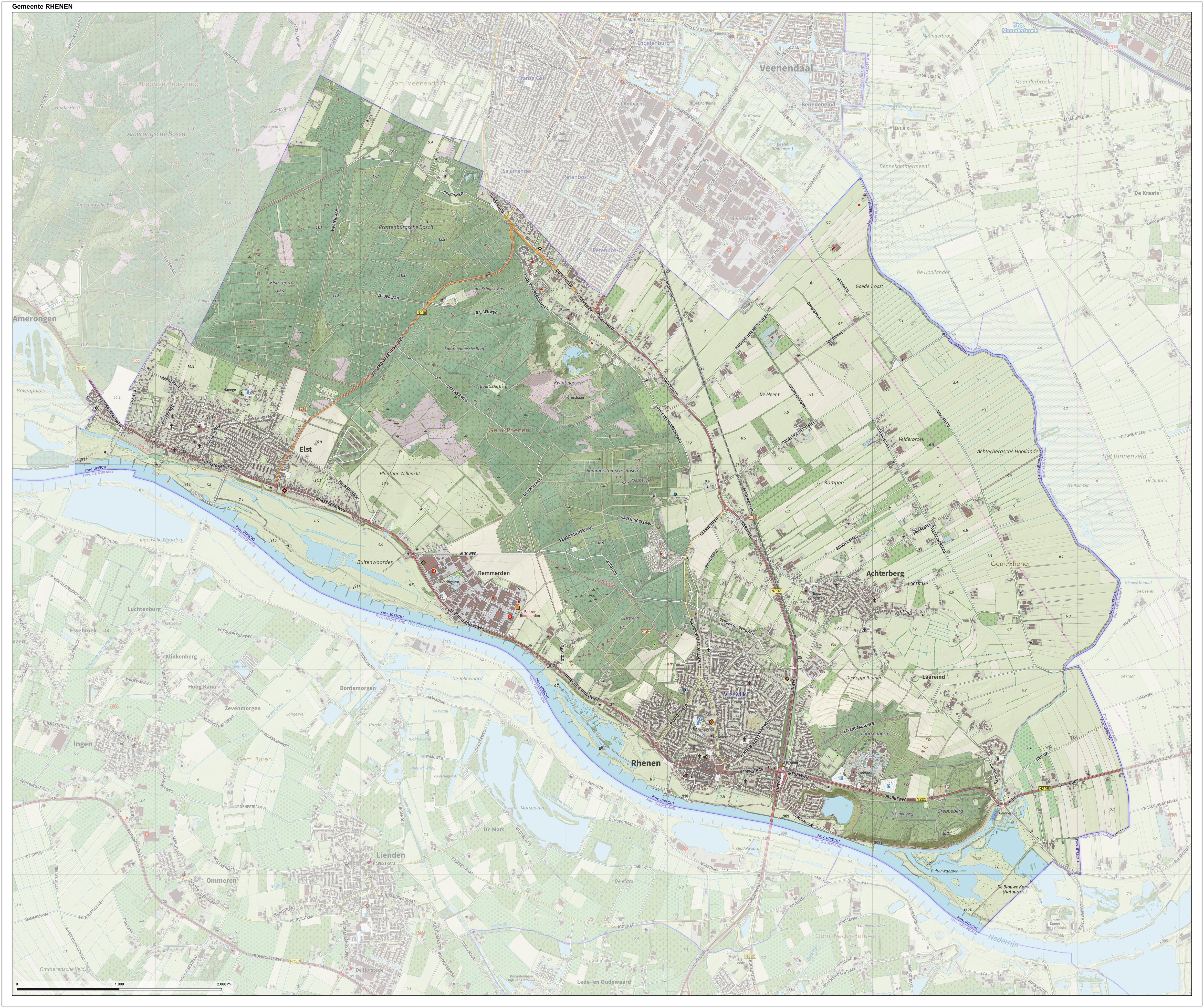 Topografische gemeentekaart. Resolutie: 400 pixels/km. Kaartbeeld samengesteld uit de open geodata van de Top10NL en Top25namen (Kadaster), Creative Commons-BY licentie. Gebouwvlakken uit open geodata BAG extract. Wegen uit de OpenStreetMap, OpenStreetMap community. Reliëfschaduw uit de Actuele Hoogtekaart AHN2. Samenstelling en kleurenschema: Jan-Willem van Aalst, met QGIS. Zie ook de Legenda.